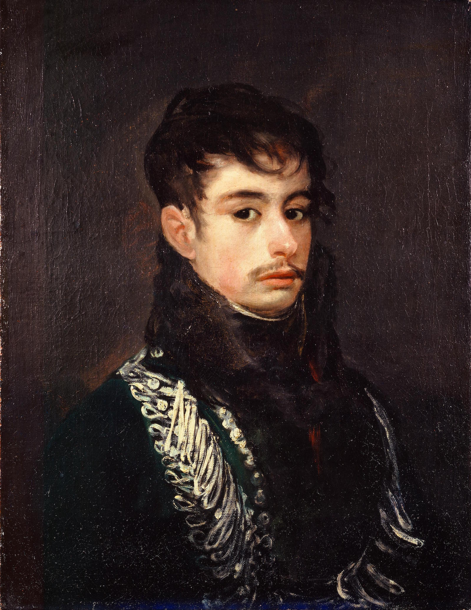 Francisco de Goya, retrato de Eugenio Eulalio Palafox y Portocarrero, conde de Teba, VII conde de Montijo. Óleo sobre lienzo, 63 x 48 cm, Nueva York, The Frick Collection